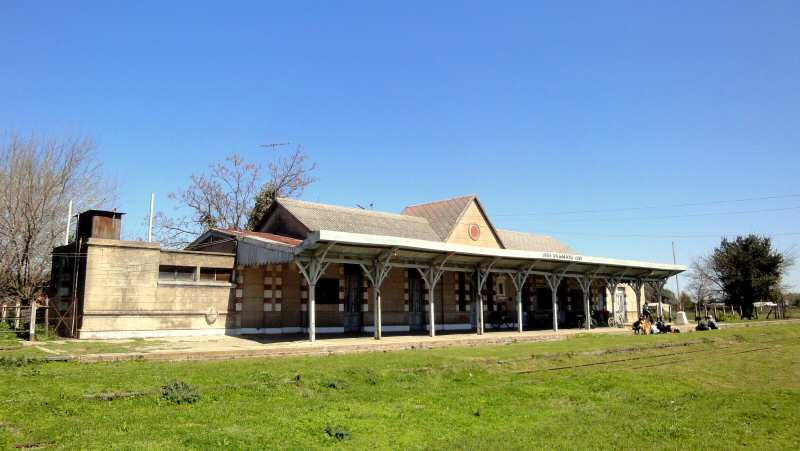 Estación Torres del FCGU, ramal Lacroze - Rojas